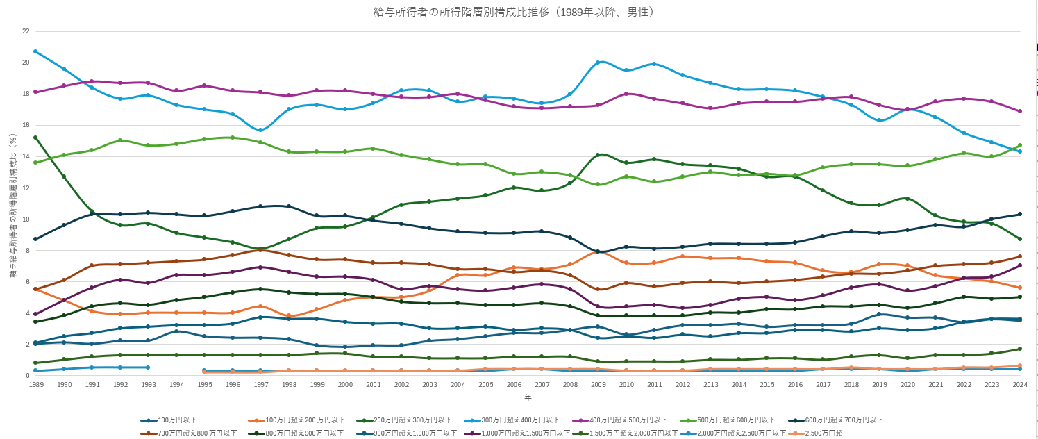 1989年以降の男性給与所得者の所得階層別構成比推移